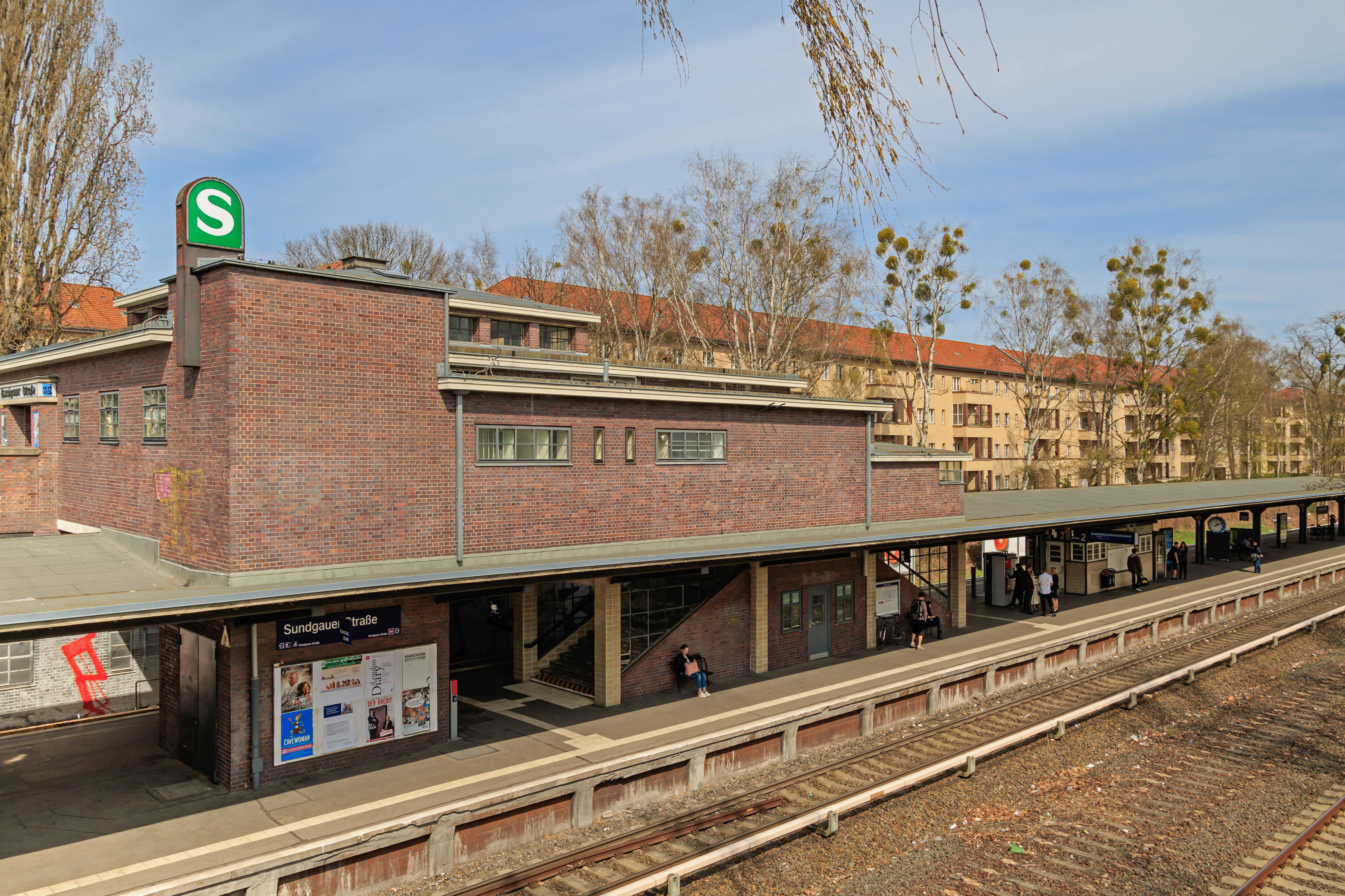 S-Bahnhof Sundgauer Straße in Berlin